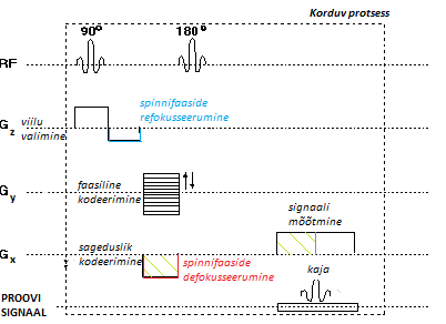 Tüüpiline lihtsustatud MRT mõõteprotseduur